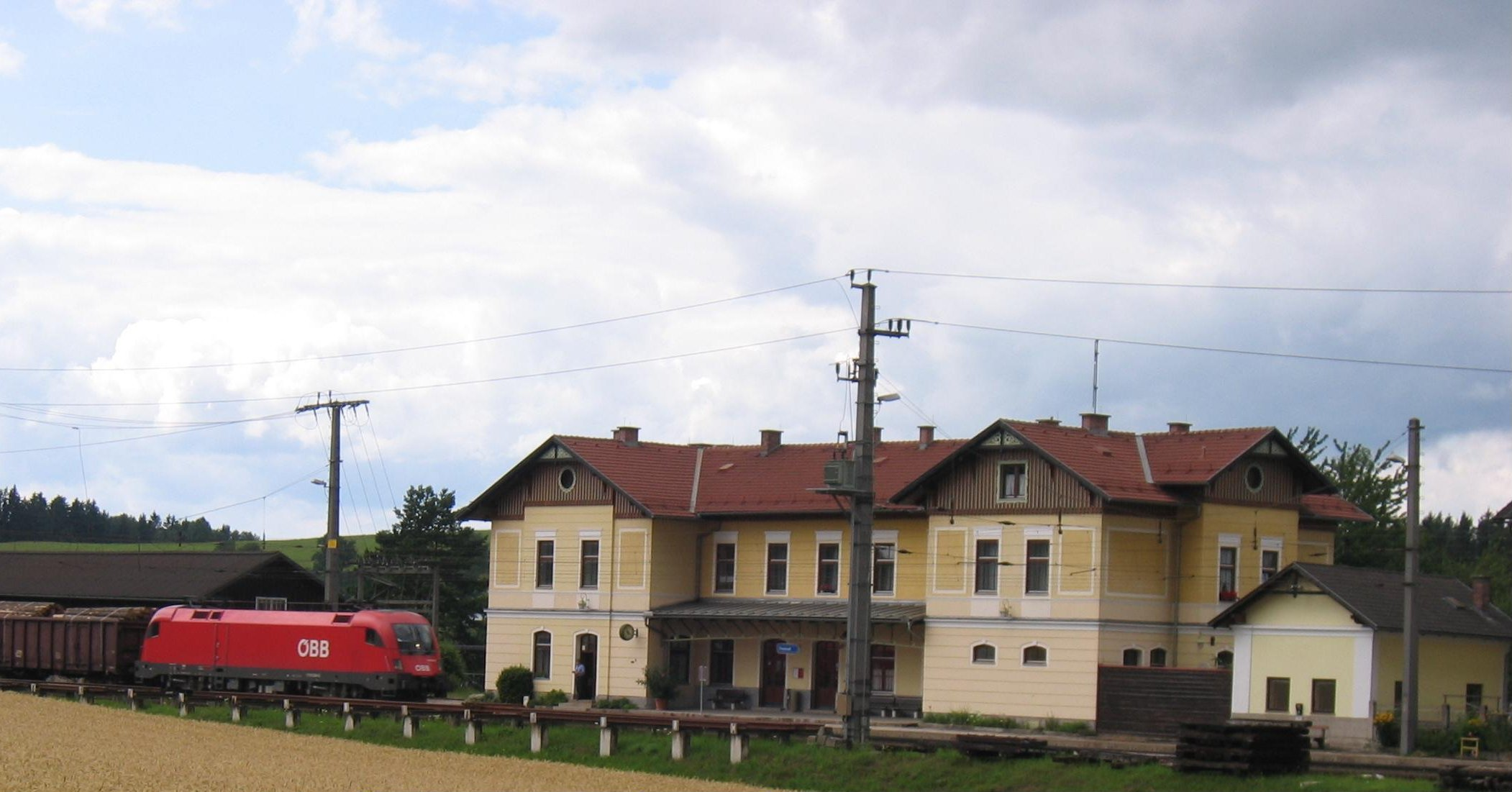 Bahnhof Freistadt mit Güterzug